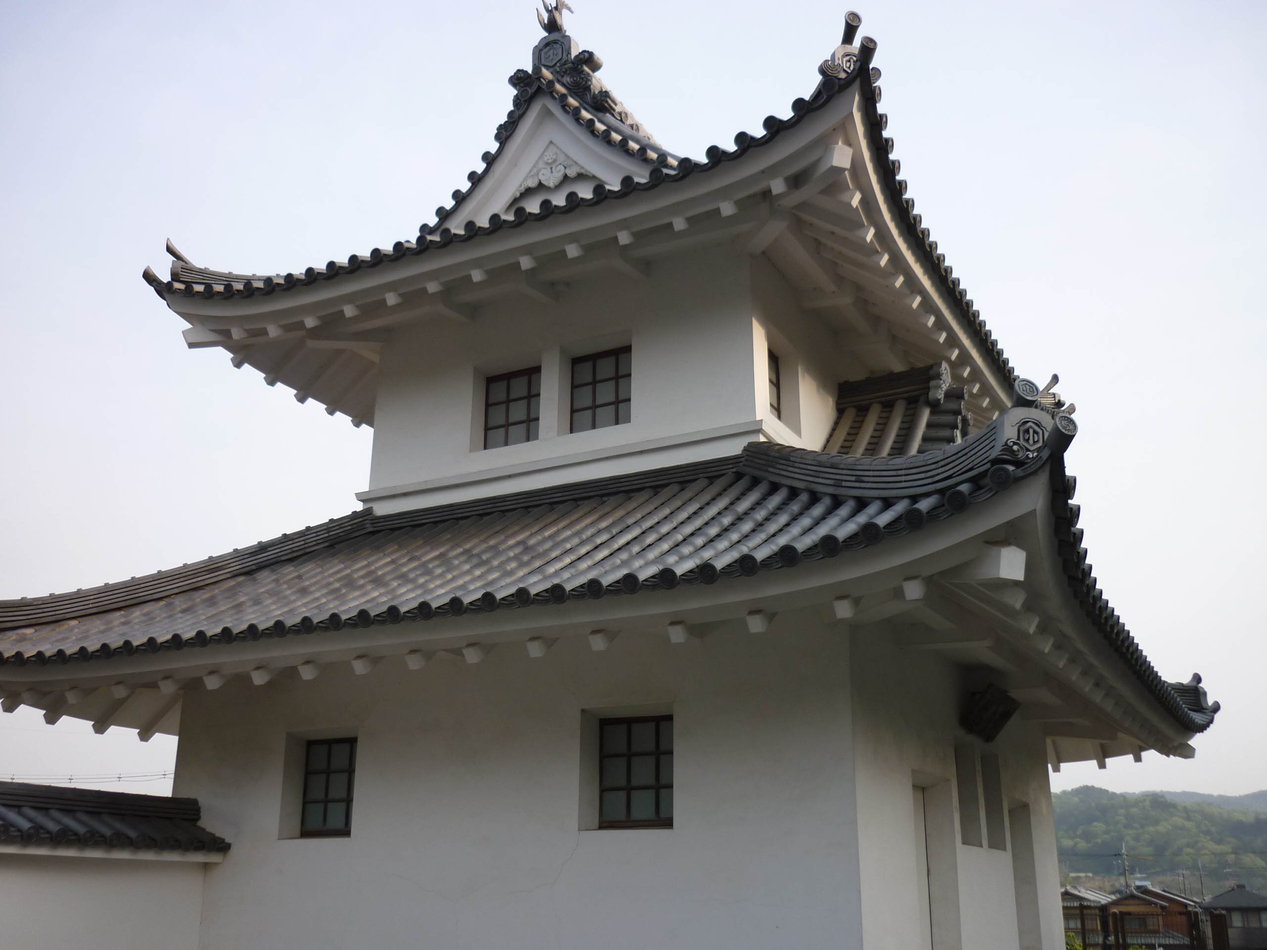 巽櫓